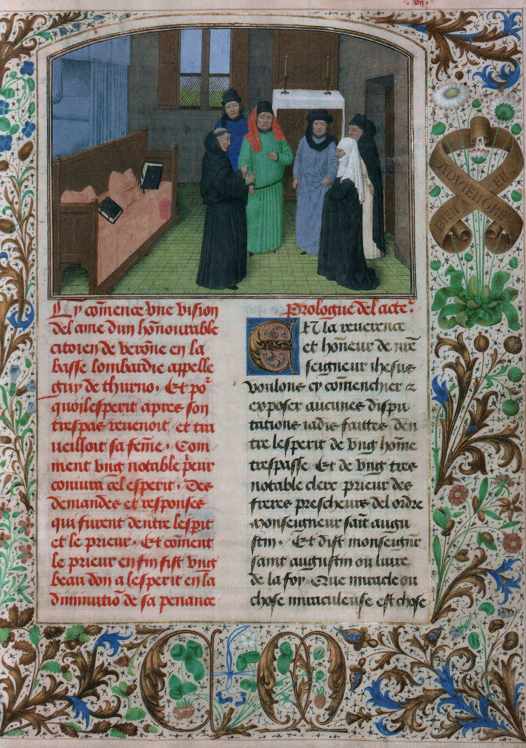 Jean Gobi accompagné de la veuve et de quatre témoins observent le spectre de Gui de Corvo. Seule représentation médiévale connue d'un être invisible (fantôme). "La vision d'âme...". Miniature de Simon Marmion